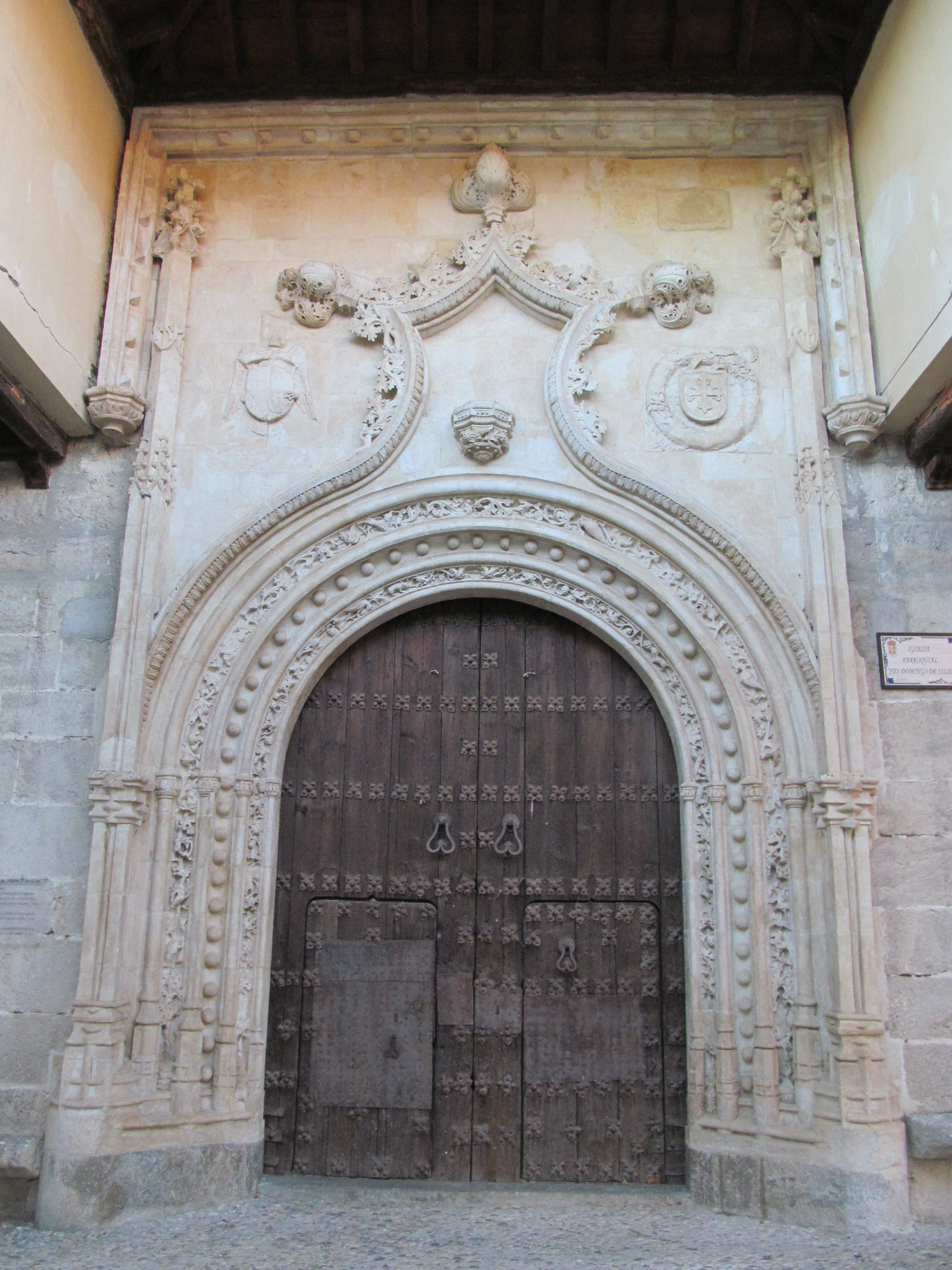 Almonacid de Zorita - Iglesia Parroquial de Santo Domingo de Silos obra del s. XV. La portada tallada en piedra caliza, ha sido recientemente restaurada. Una parte de la obra está inacabada